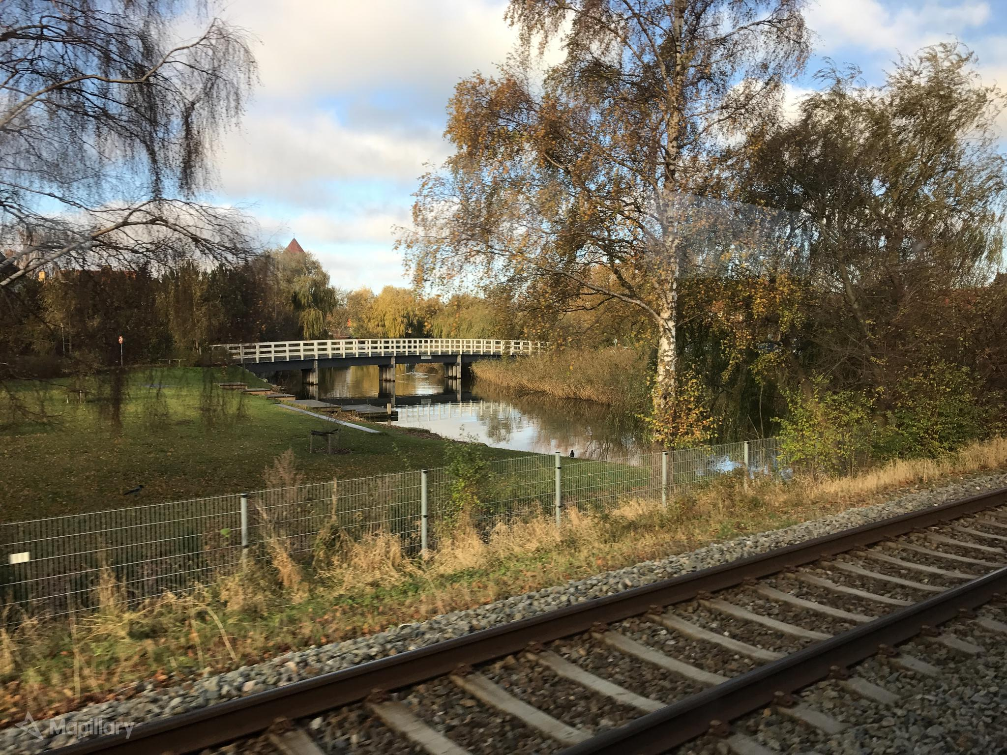 Høllingers Bro over Køge Å set fra jernbanen